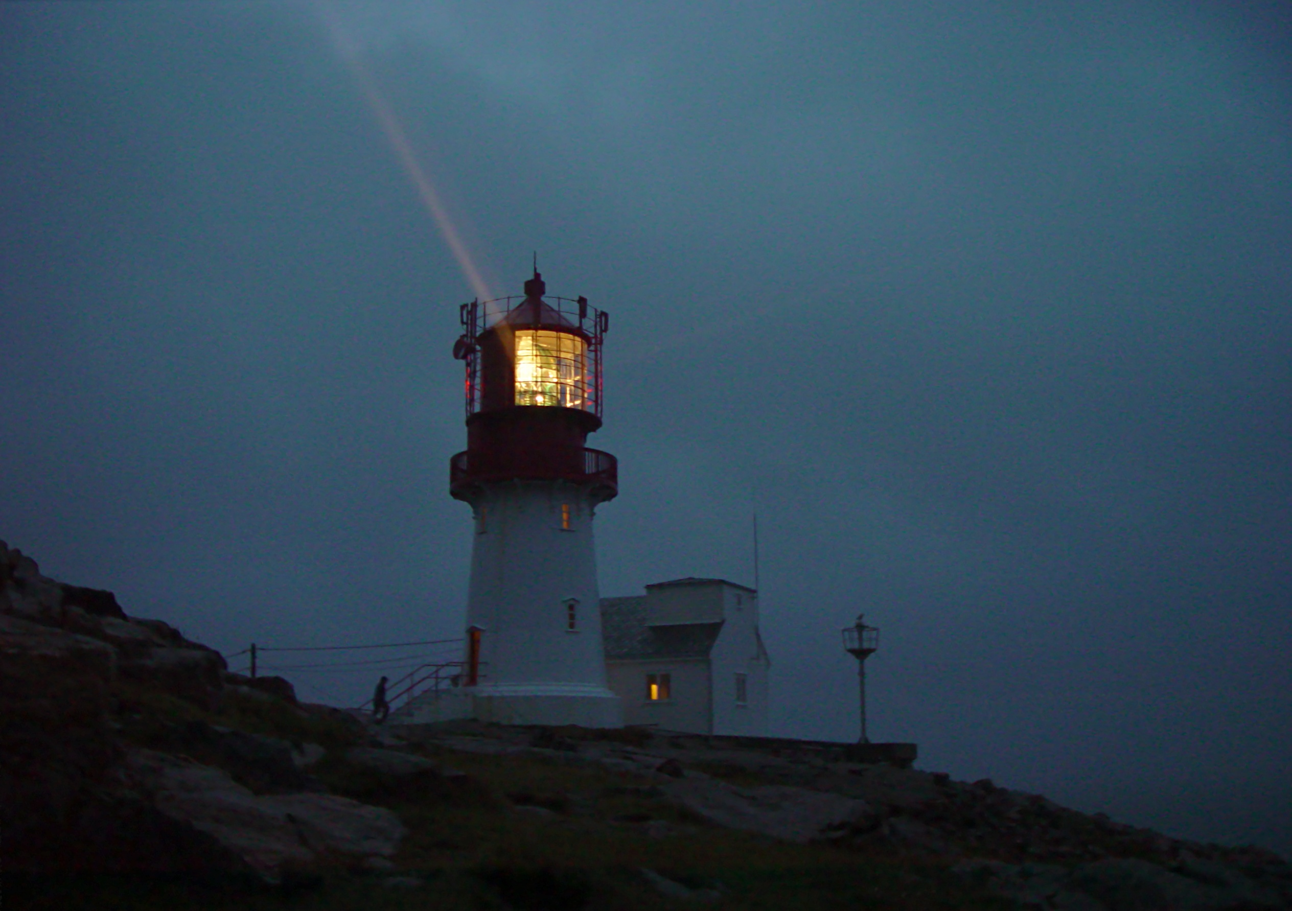 Lindesnes fyr